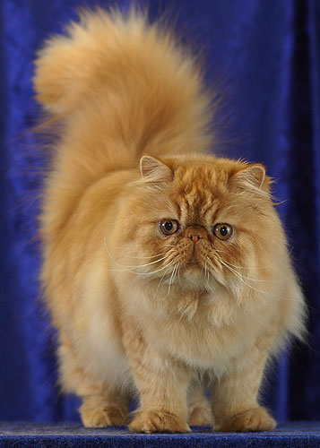 Oma kuva.